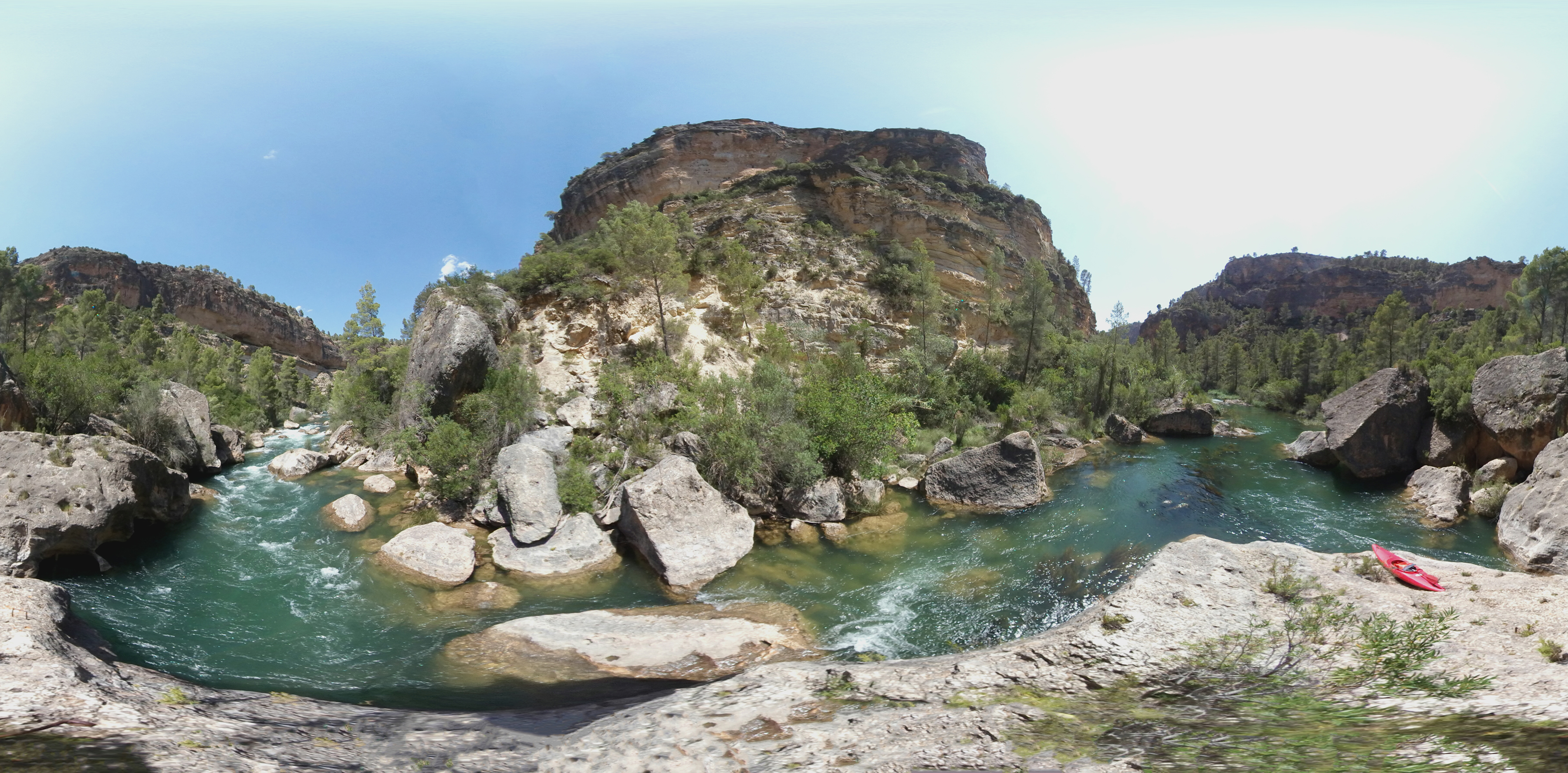 Hoz del purgatorio